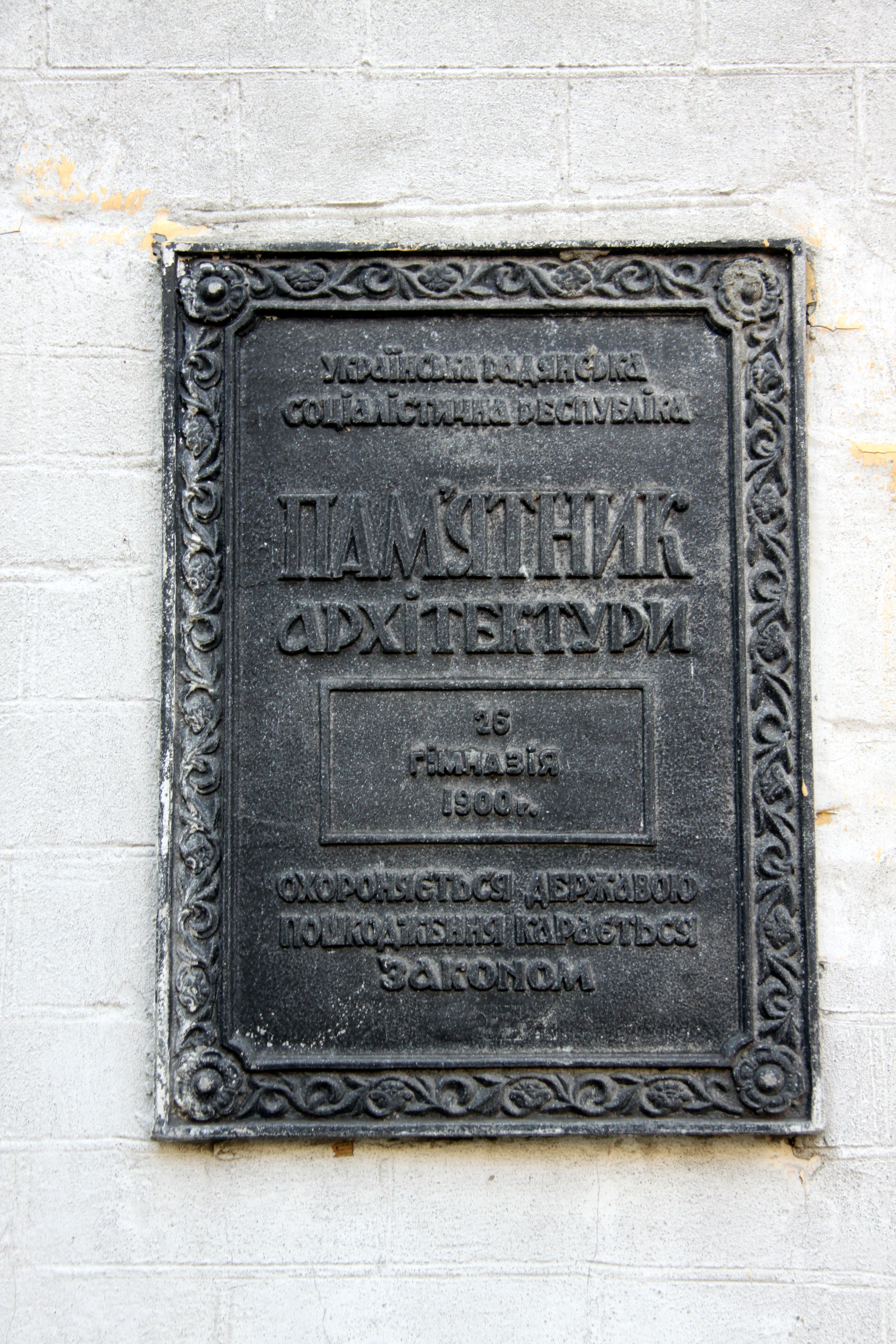 Будинок реального училища та гімназія євангелістської лютеранської громади, Київ, Лютеранська вул., 18-20